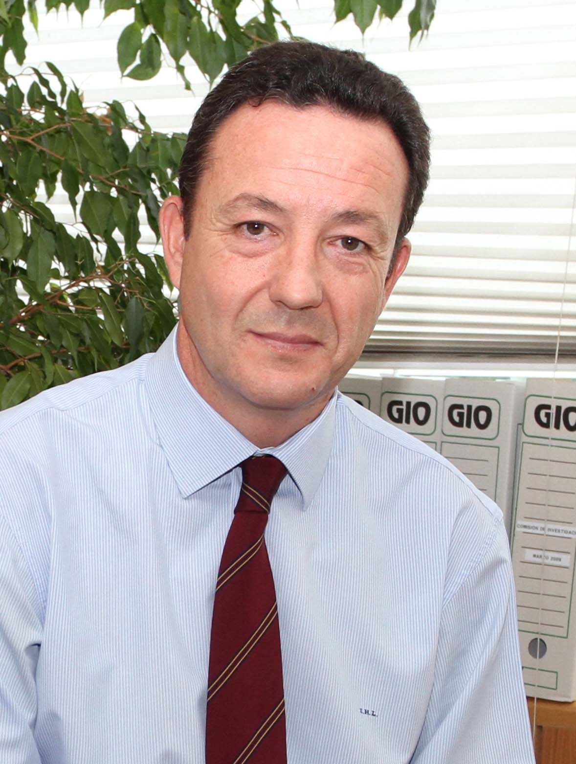 Íñigo Henríquez de Luna, portavoz del Grupo Popular en la Asamblea de Madrid